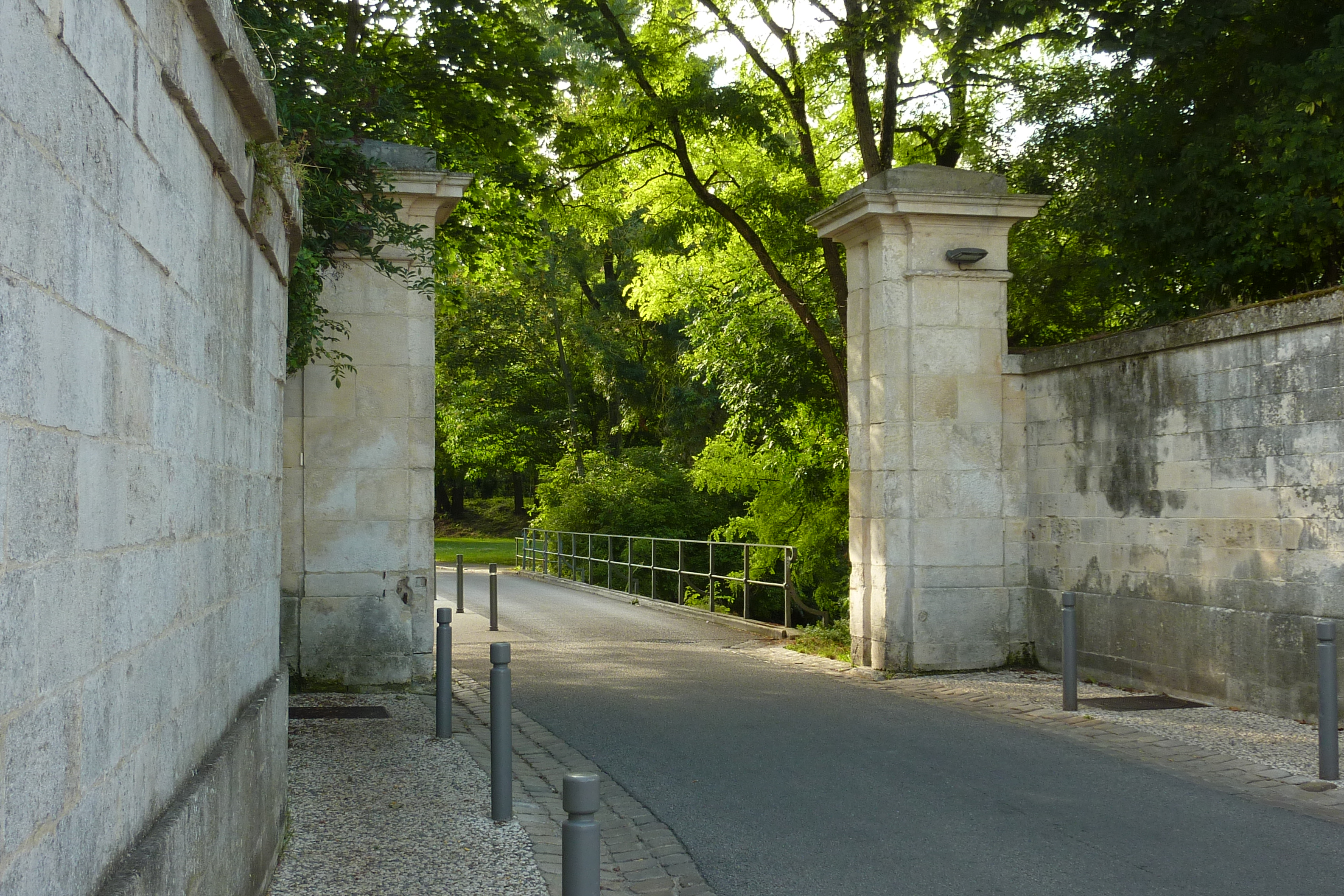 Porte Neuve côté intérieur La Rochelle Charente-Maritime France